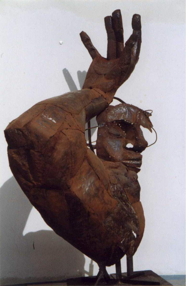 "La mano de Dios" Escultura en metal, del escultor Sergio Ardohain, año 2004